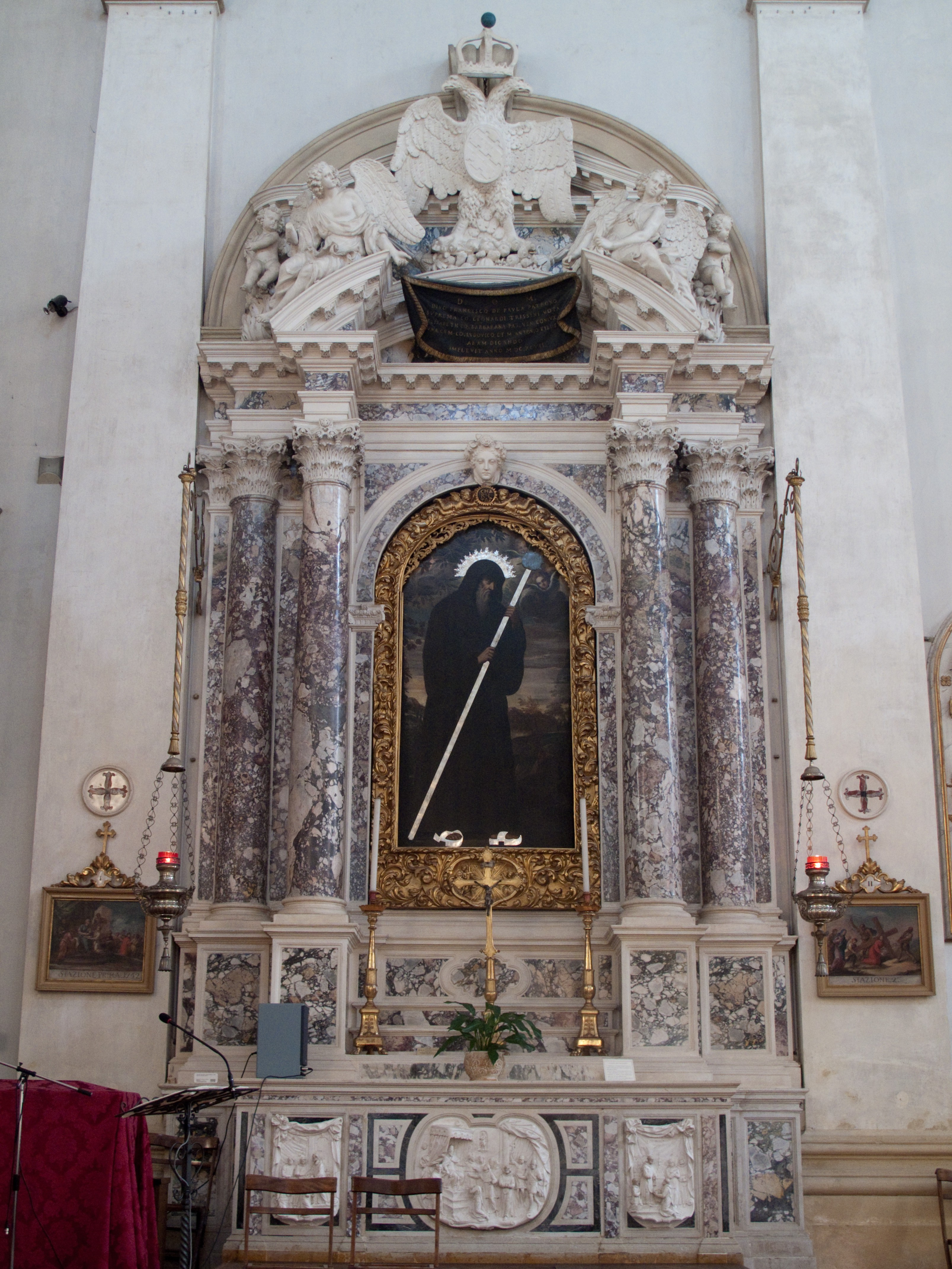 Vicenza - Chiesa di San Giuliano - Altare di San Francesco di Paola